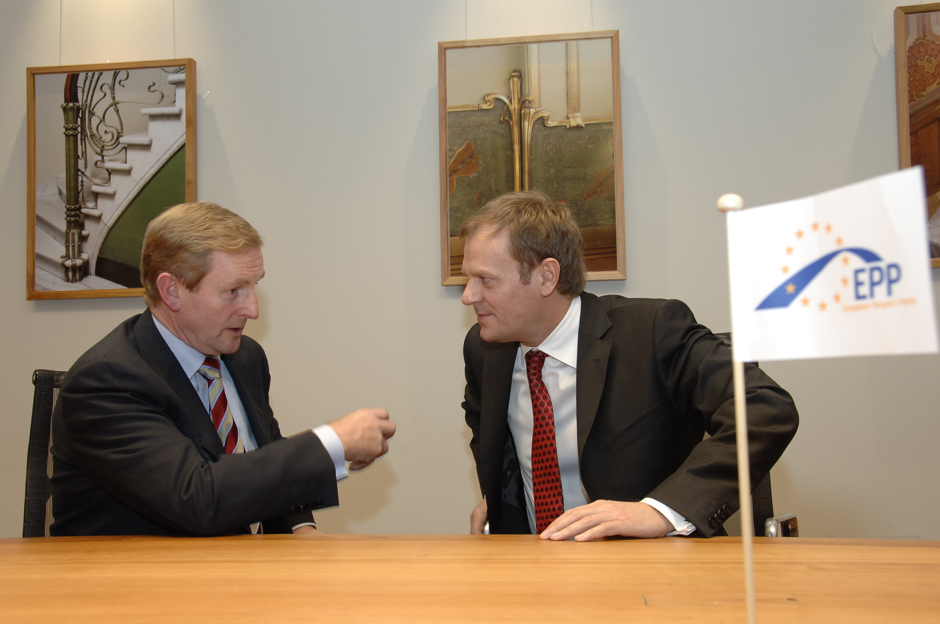 EPP Summit 13 December 2007